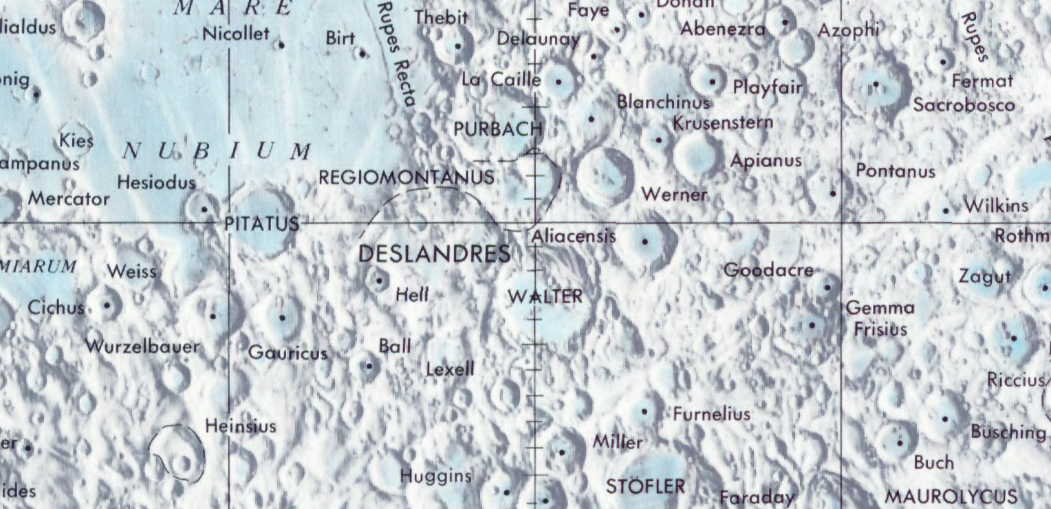 Cráter lunar Walther. Localización. (Lunar Chart LPC1. Second Edition)